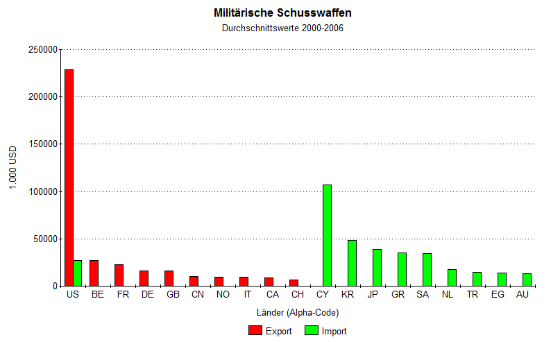 Chart der 20 größten Ex- und Importländer bzgl. militärischer Kleinwaffen SALW 2000-2006, Daten vom Small Arms Survey Report 2009: Authorized Small Arms Transfers PDF-Datei (2,53 MB)